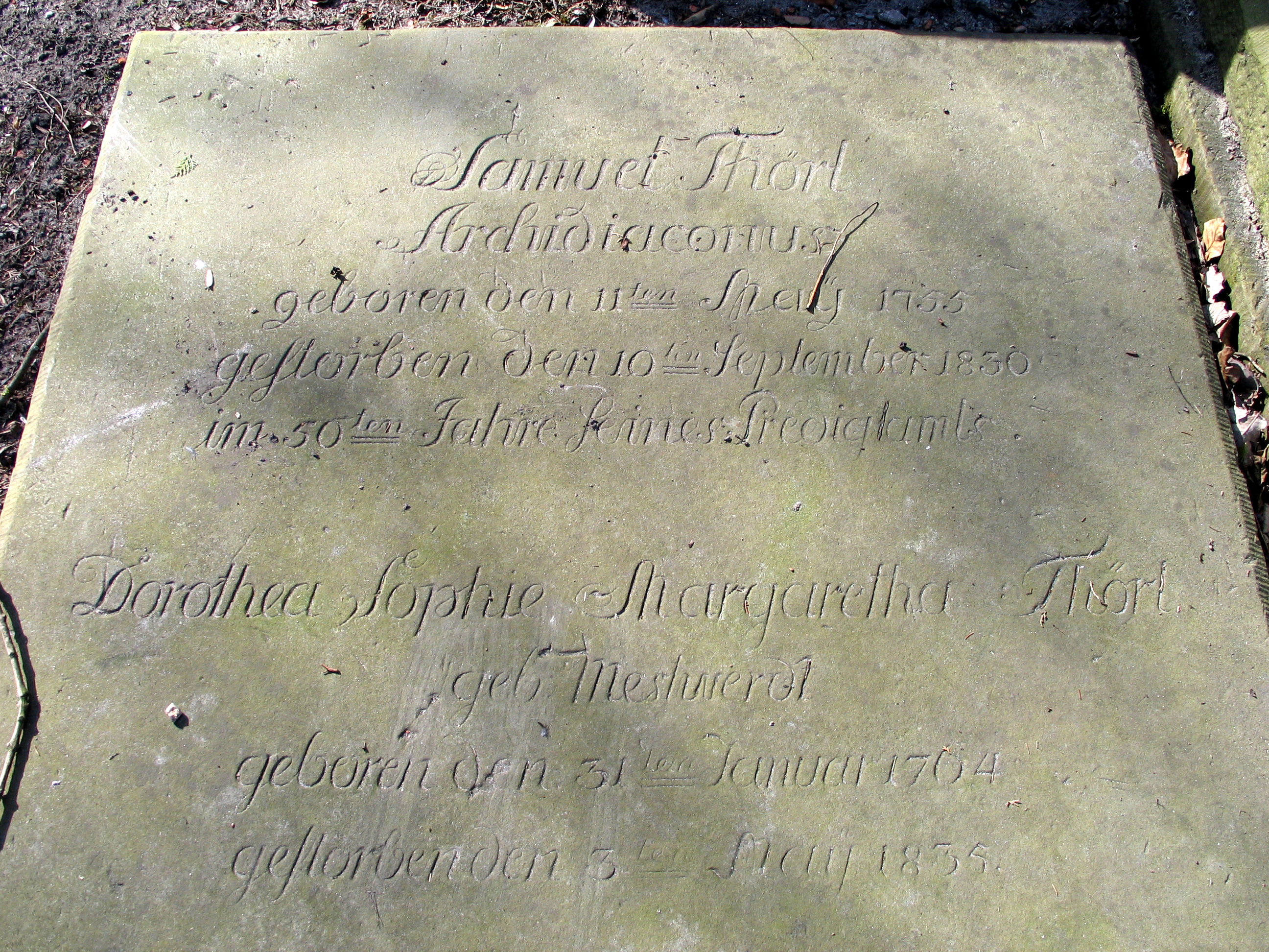 Foto vom Helentorfriedhof, östlicher Teil ...